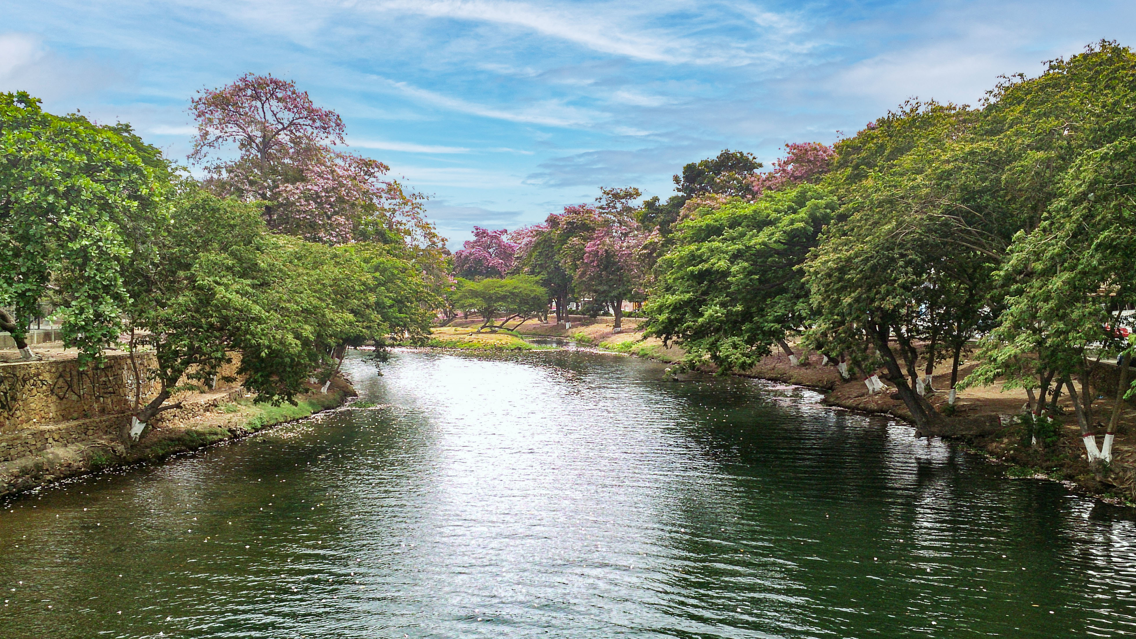 Fotografía del Río Neverí que atraviesa la ciudad de Barcelona desde el Puente Boyaca, Estado Anzoátegui, Venezuela.